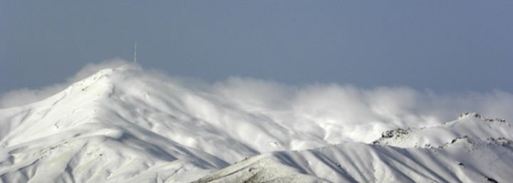 نمایی از جبهه ی شمالی کوه وزنه